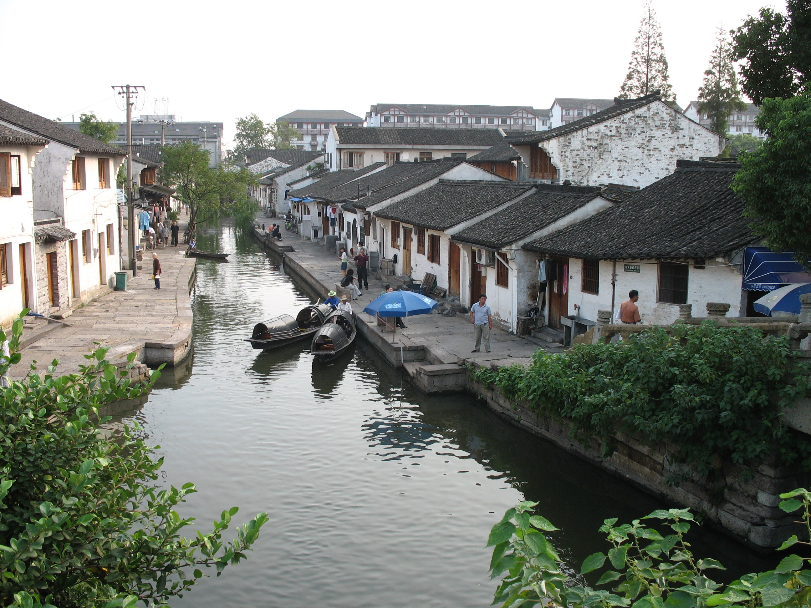 拍摄于2006.10.3于绍兴八字桥附近